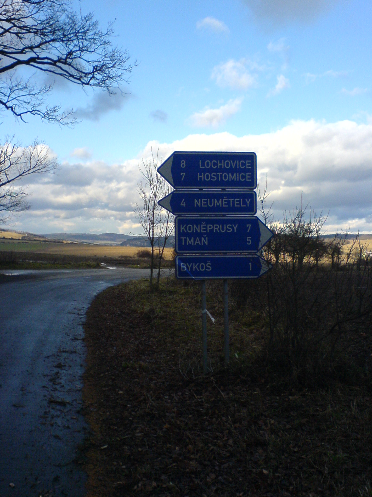 Ukazatele v Housinském sedle